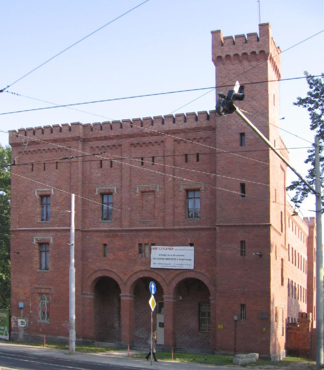 Dawny odwach i komora celna przy ul. Drobnera we Wrocławiu.